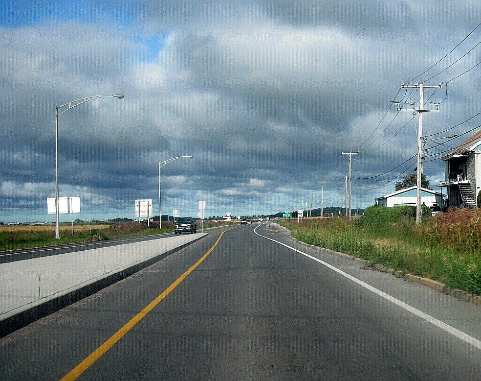 Vue sur la route québécoise 169, à Métabetchouan-Lac- à-la-Croix, à l'est du Lac-Saint-Jean, Québec, Canada.